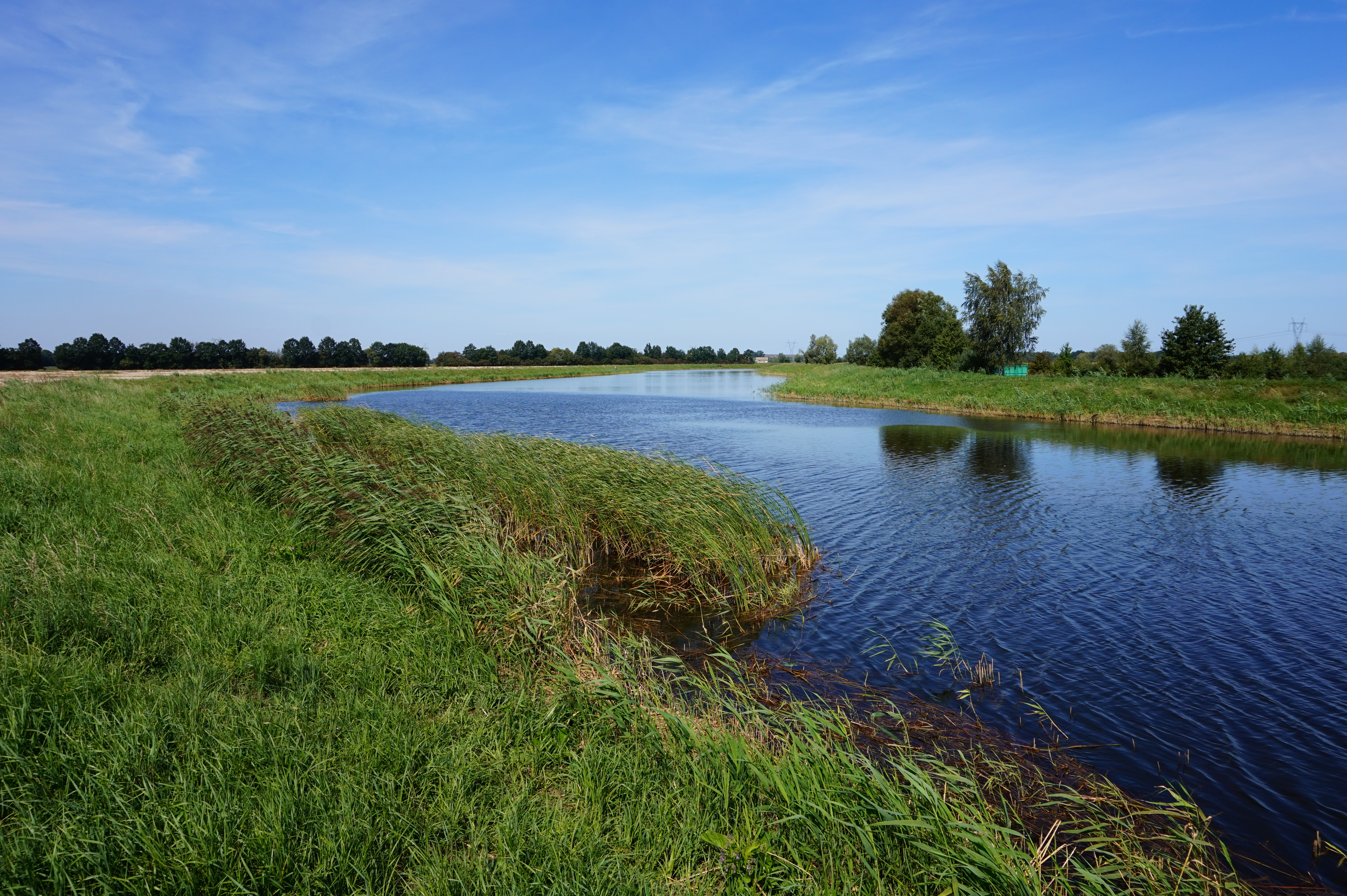 Kanał Śledziowy okolice wsi Błotnik